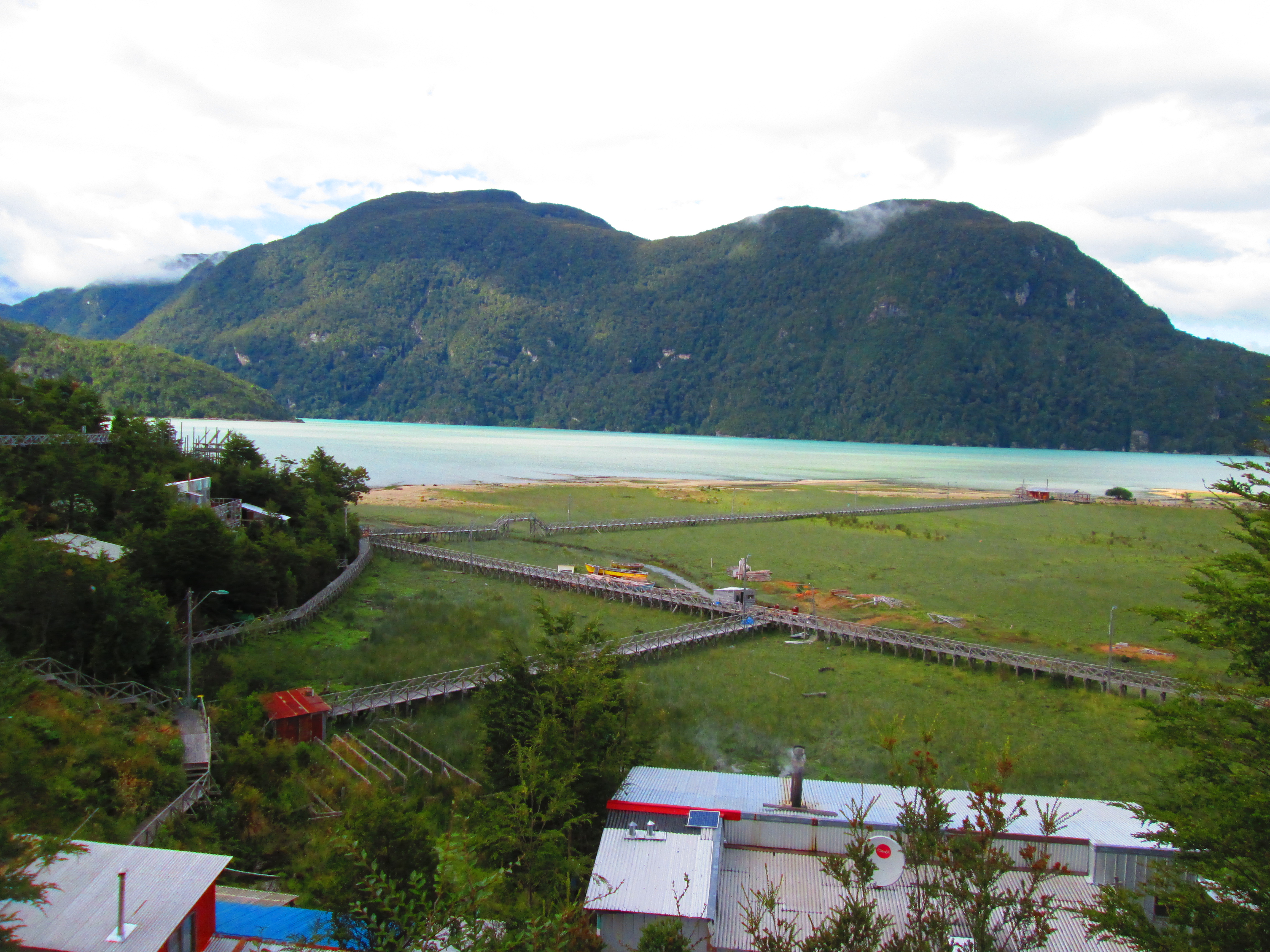 Sector Playa Ancha de Caleta Tortel, región de Aysén.